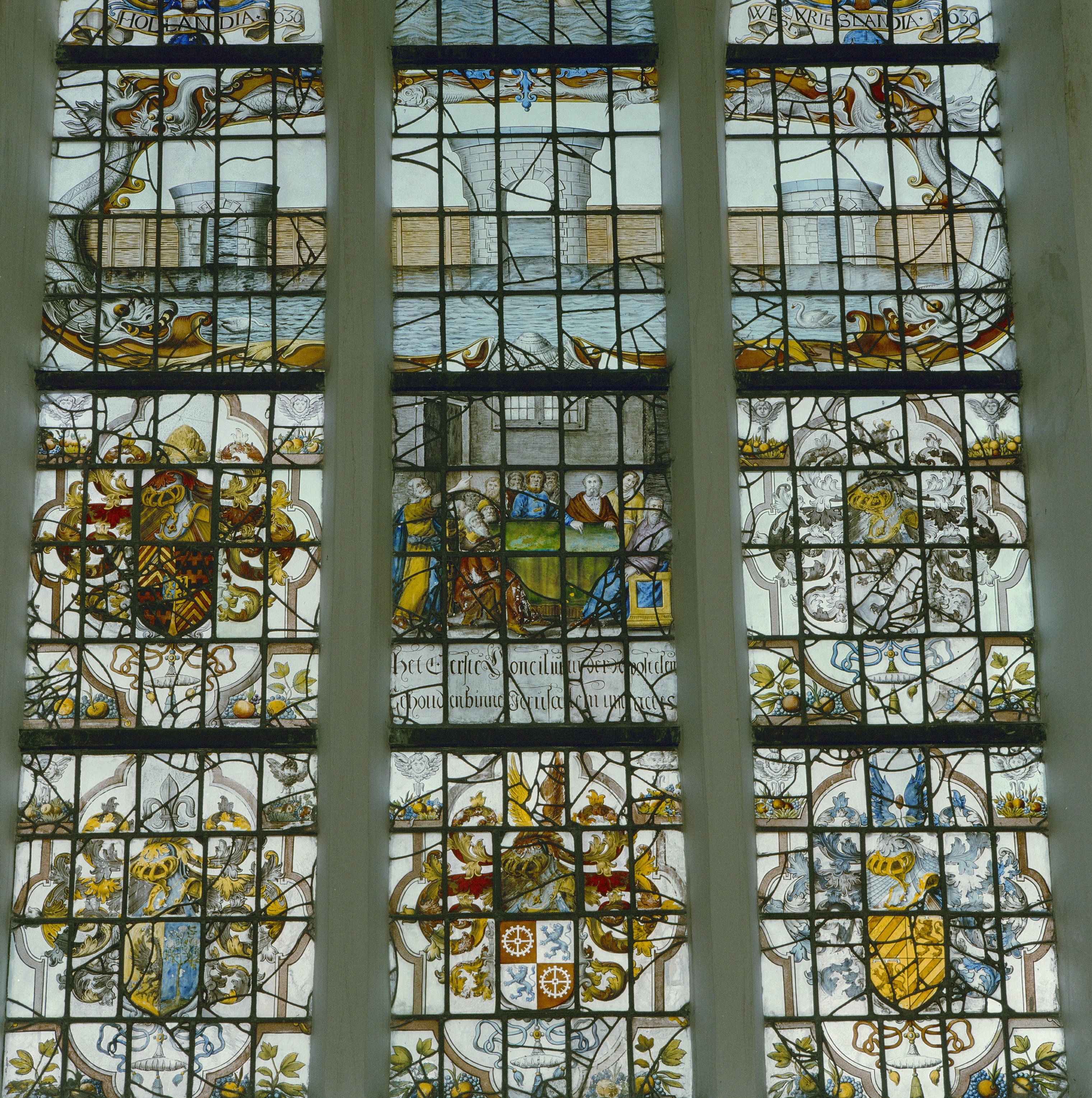 Nederlands Hervormde Kerk: INTERIEUR, GEBRANDSCHILDERDE RAMEN, RAAM 4, DETAIL